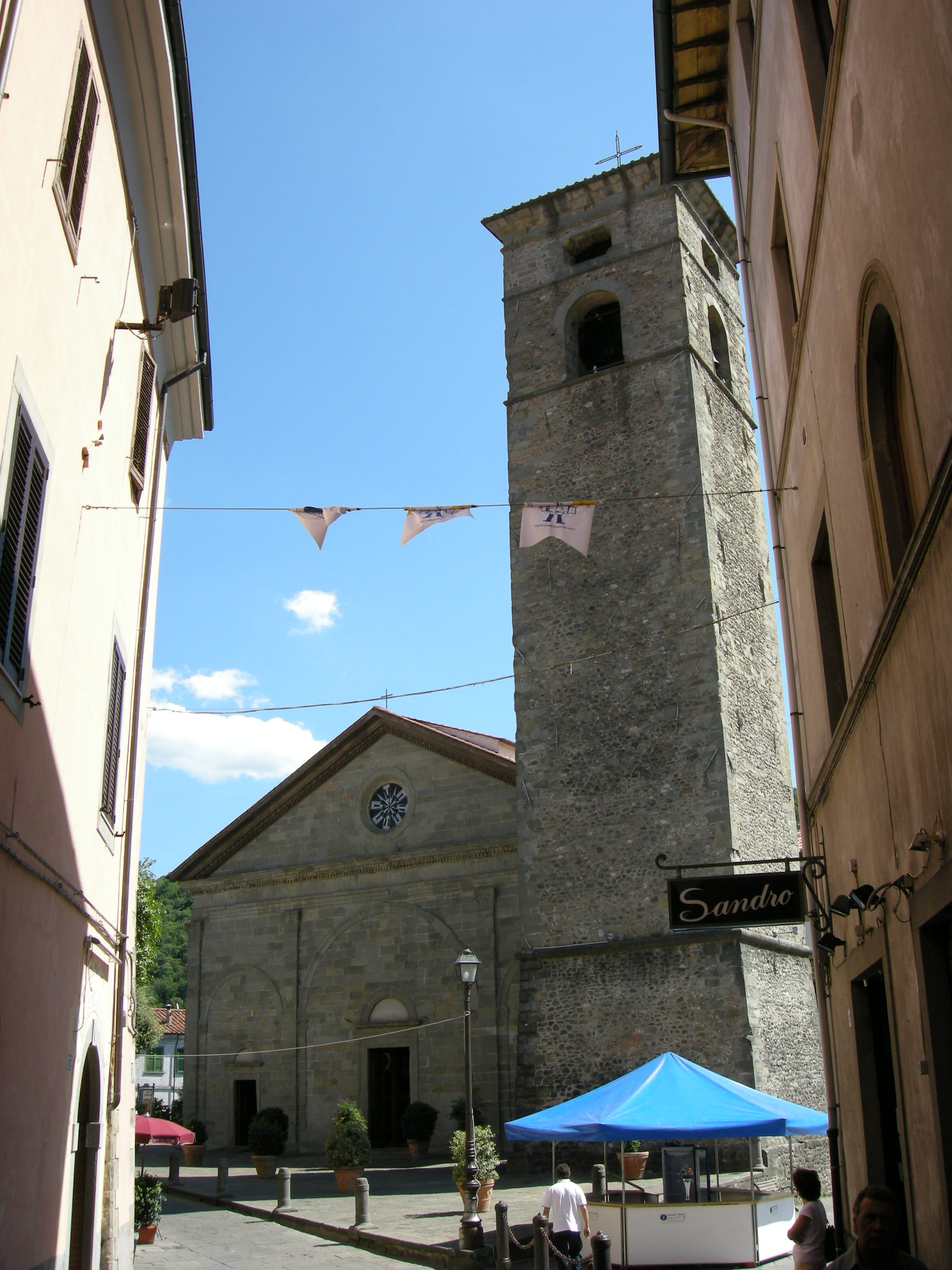 Duomo di castelnuovo, esterno